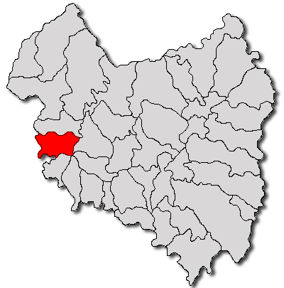 Categorie:Hărţi ale judeţului Covasna